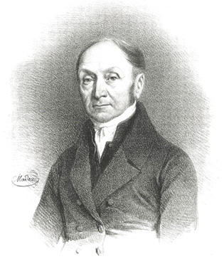 Lithographie de Jean-Baptiste Madou, représentant le philosophe Louis Gruyer, né à Bruxelles le 15 novembre 1778 et décédé célibataire dans sa ville natale le 15 octobre 1866 à Bruxelles 1000, 98 bis rue de Ruysbroeck. Enterré au cimetière de St Gilles. Il fut philosophe, membre de l'Académie Royale de Belgique.